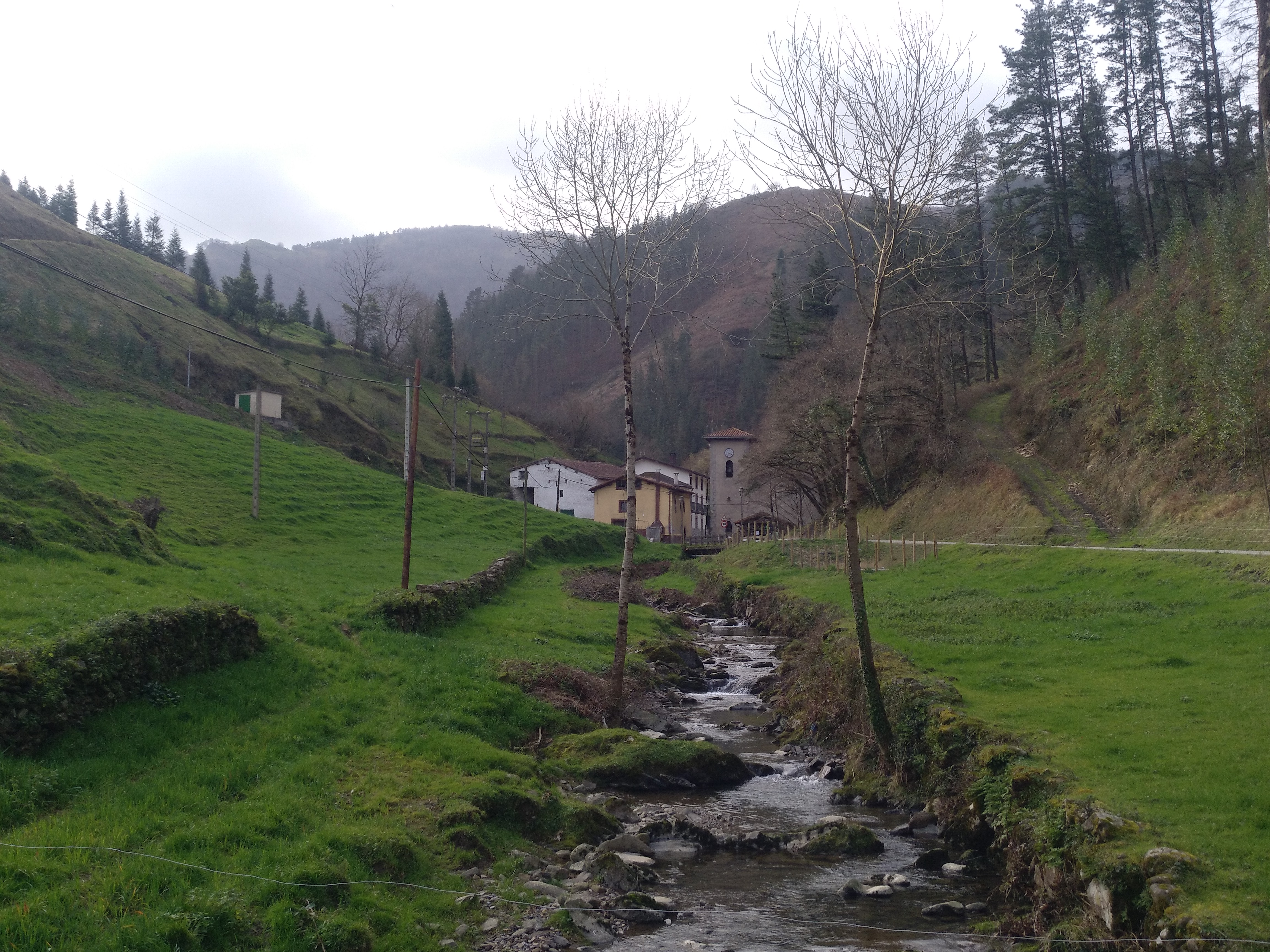 Azpeitiako Aratz-Erreka auzoa